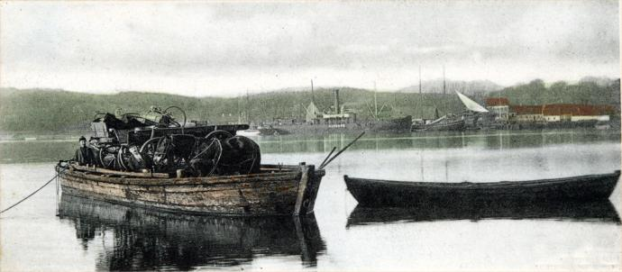 Fra 1855 og til færgeriets nedlæggelse i 1904 blev færgen trukket over fjorden ved hjælp af et tov.